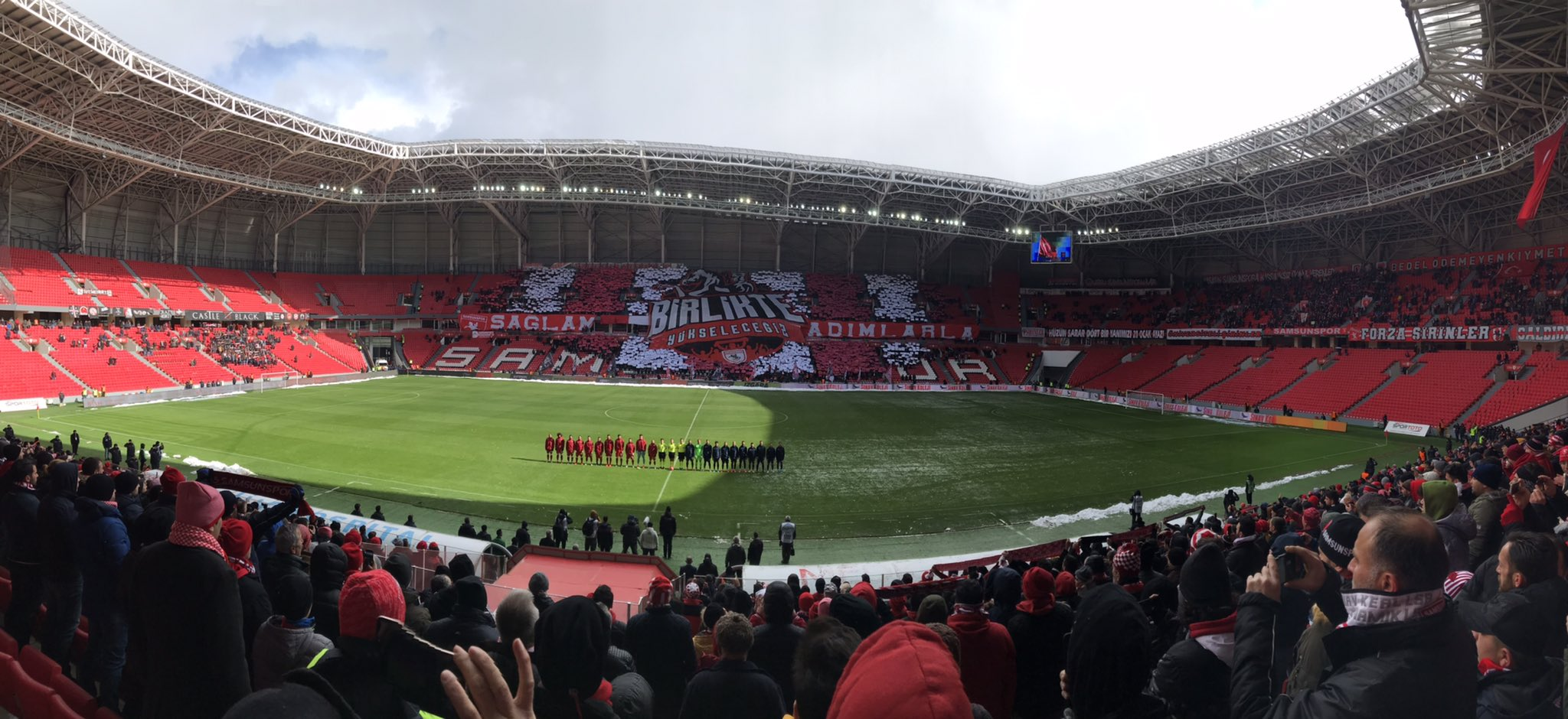 9 Şubat 2020 tarihindeki Samsunspor-Afjet Afyonspor karşılaşmasında Samsunspor taraftarının "Sağlam Adımlarla Birlikte Yükseleceğiz" koreografisi.